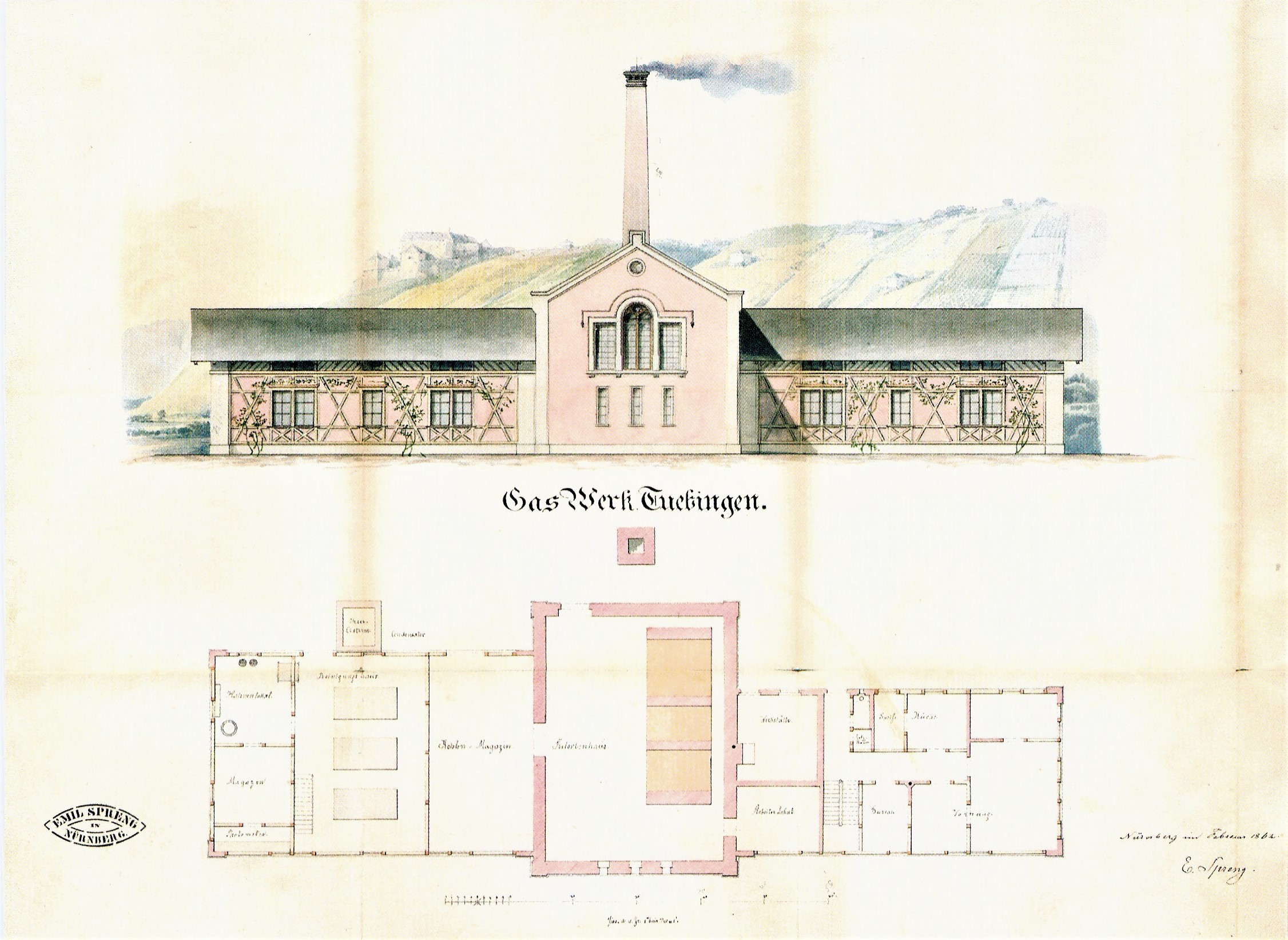 Bauplan des ersten Tübinger Gaswerks „Reutlinger Vorstadt“ – Ansicht der Fassade und Grundriss.